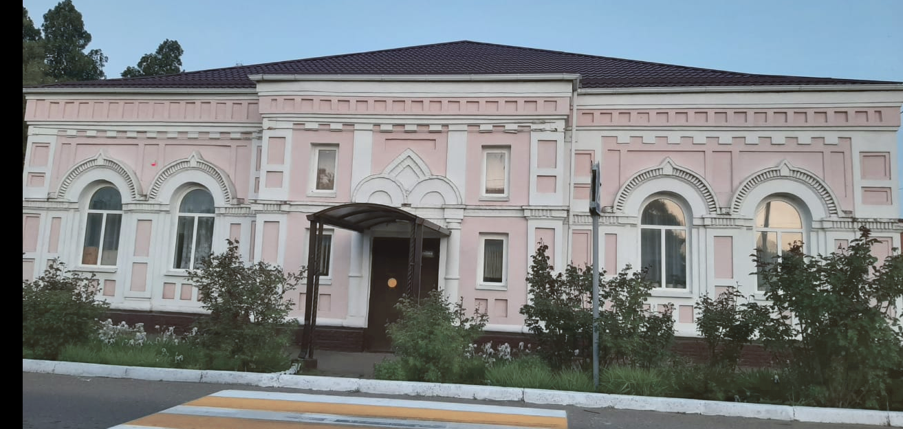 Корпус Ладожского техникума